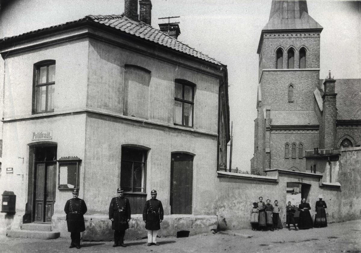 Kampen politistasjon, Normannsgata 44. Fotografert i 1894, nedlagt 1914. Ukjent fotograf. Fra Byhistorisk samling hos Oslo Museum.